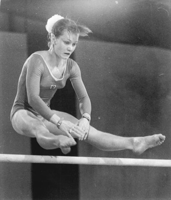 ADN-ZB-Liebers-22.4.1972-ma-Gera: DDR-Meisterschaften im Turnen. Die 20jährige Berlinerin Karin Janz, (SC Dynamo) in rasanter Aktion am Stufenbarren. Die fünffache Titelverteidigerin, kann mit einem erneuten totalen Erfolg die erfolgreichste DDR-Turnerin bei nationalen Meisterschaften werden. Ingrid Foest brachte es bisher auf 21 erst Plätze. (Karin Janz bisher 17)